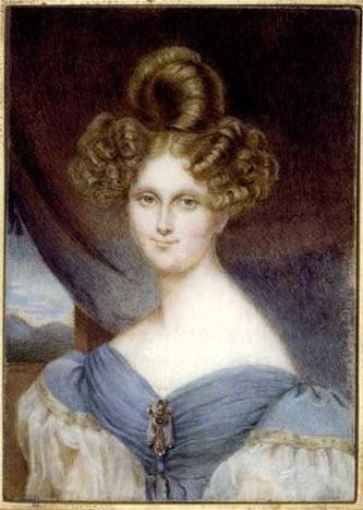 Анна Михайловна Хилкова (1799—1868), в первом браке за С. Г. Щербатовым, во втором - за А. Н. Толстым.